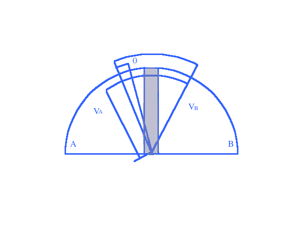 الابرة المتحركة في المروحة موجبة الشحنة للفولتمتر الإلكتروستاتيكي